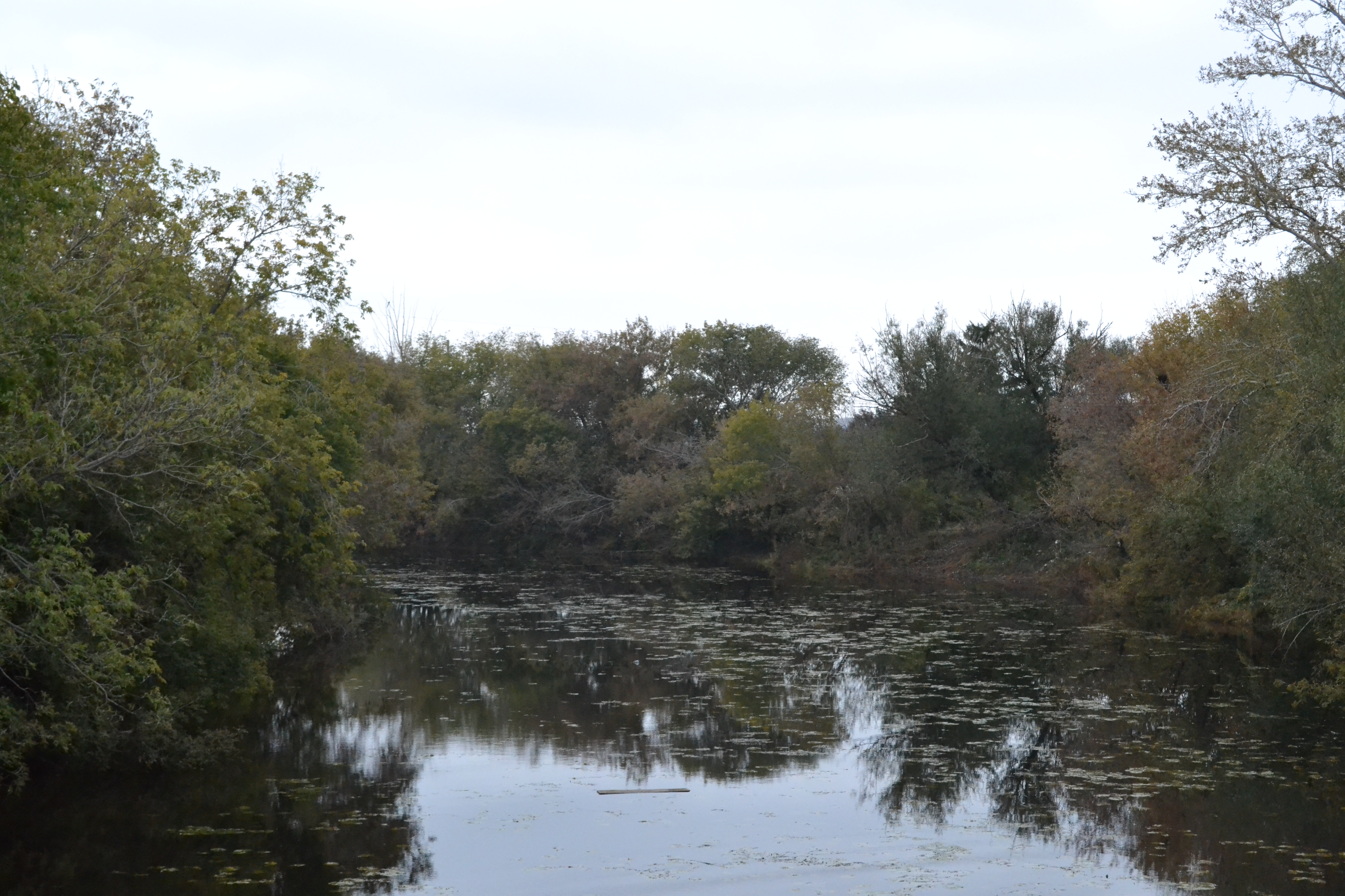 Чаган